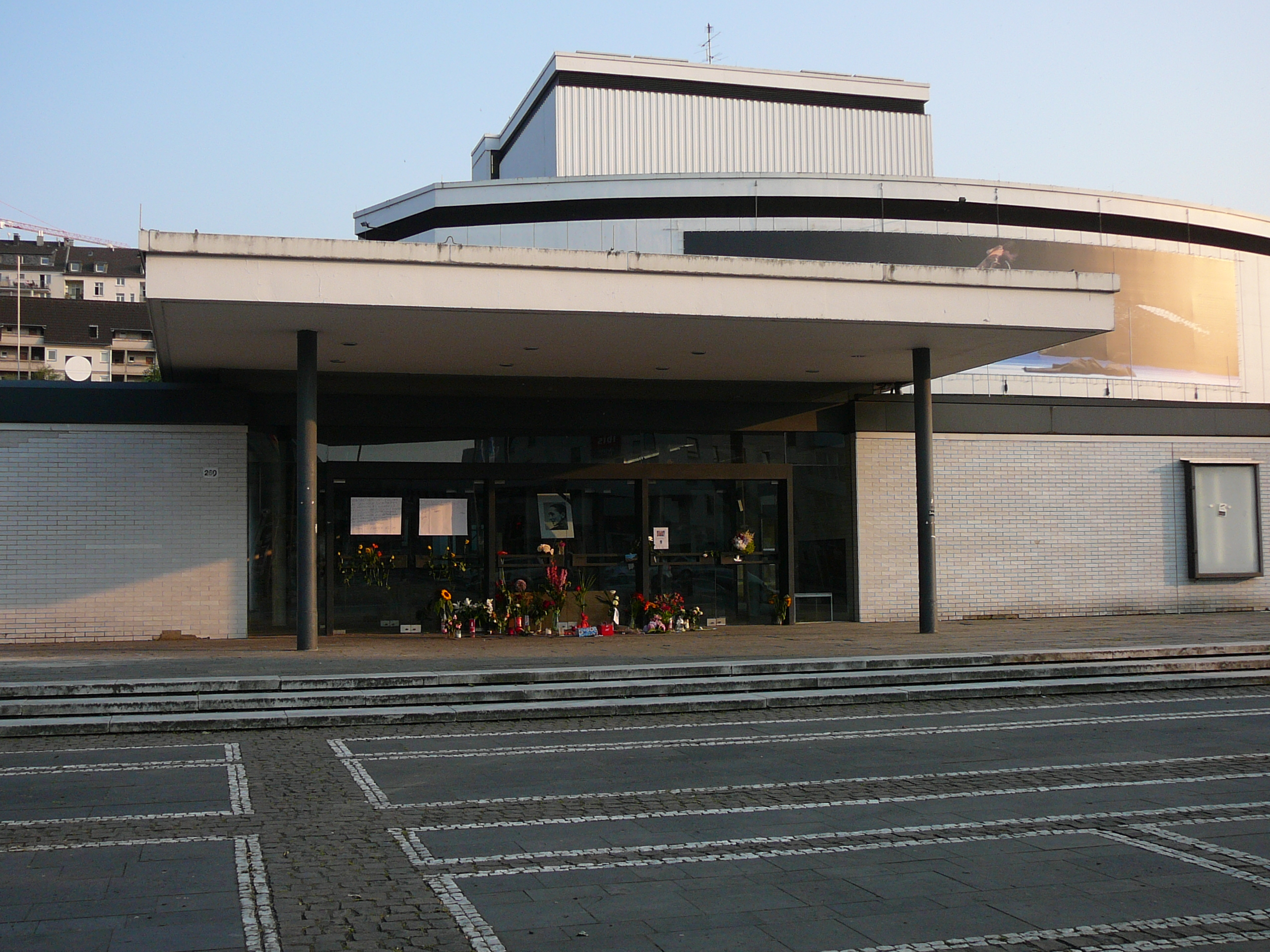 Kondolenz für Pina Bausch am Schauspielhaus in Wuppertal